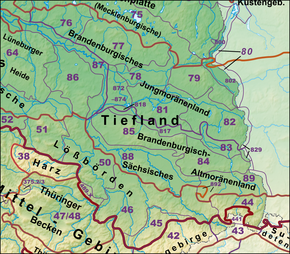 Haupteinheitengruppen im Osten des Norddeutschen Tieflandes nebst Lössbörden